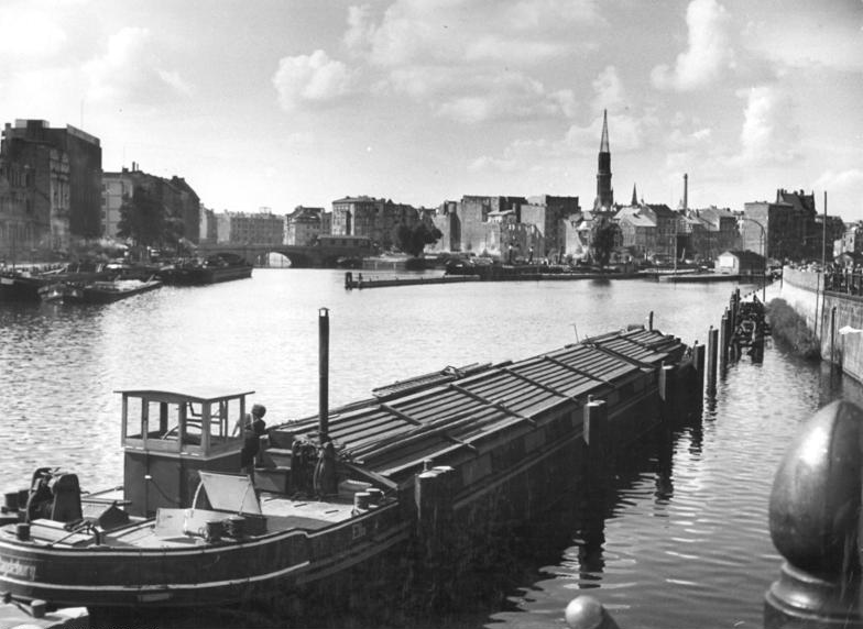 Zentralbild Weiß 11.9.1952 Berlin 1952 Blick von der Waisenbrücke auf die Inselbrücke (links) und die Mühlendamm-Schleuse.